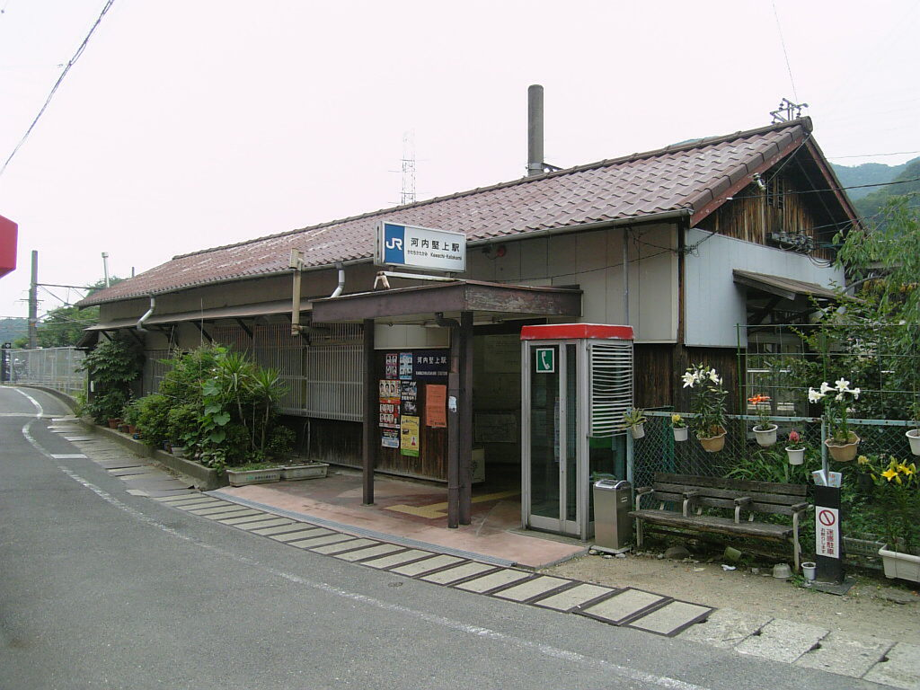 JR河内堅上駅舎 2007年6月17日撮影。 機材：V604SH 撮影者：Kansai explorer